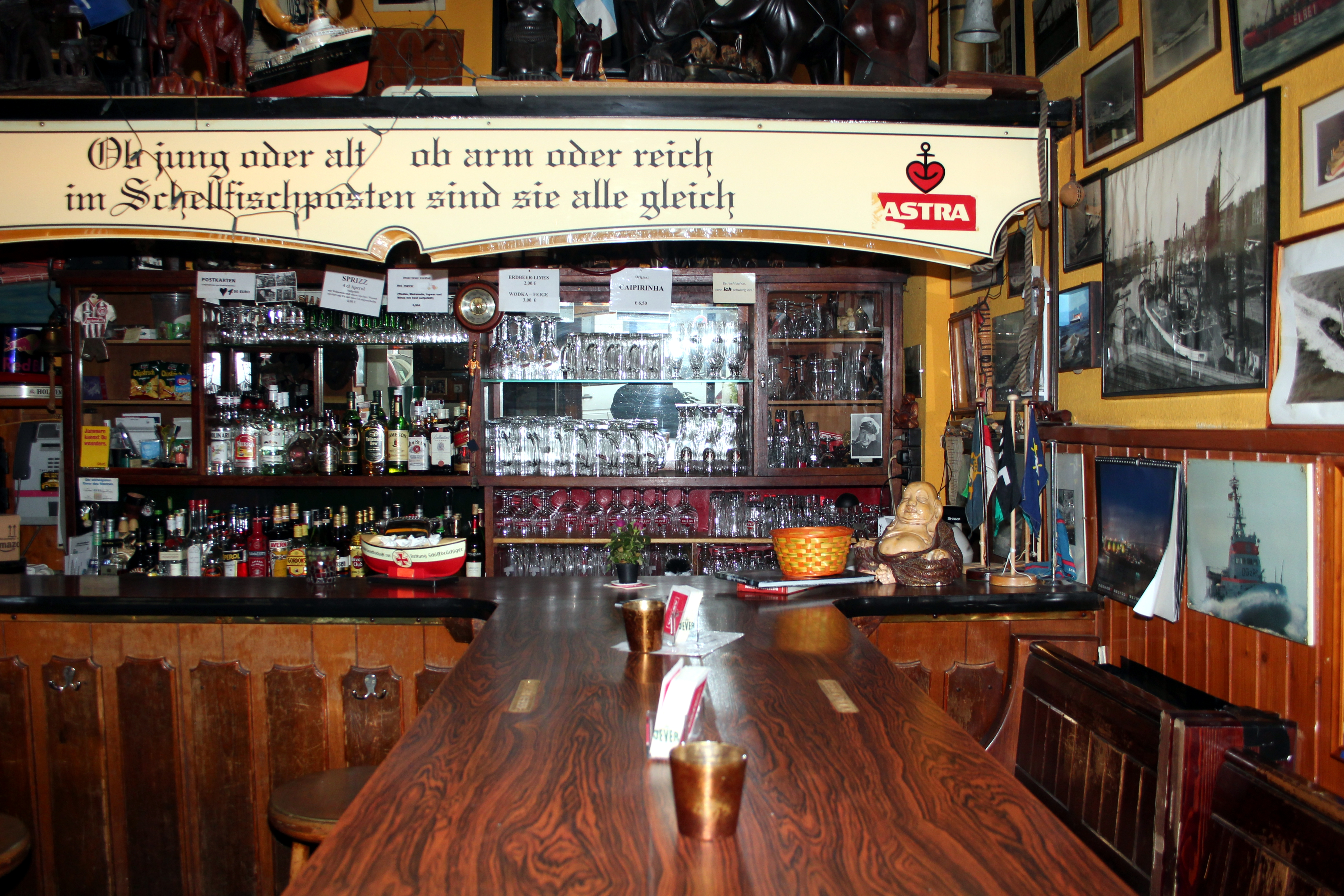 Foto zeigt den Innenraum vom " Schellfischposten "